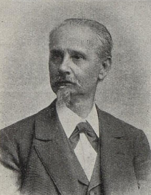 Antonín Gareis (1837-1922), český grafik, malíř, kreslíř a ilustrátor